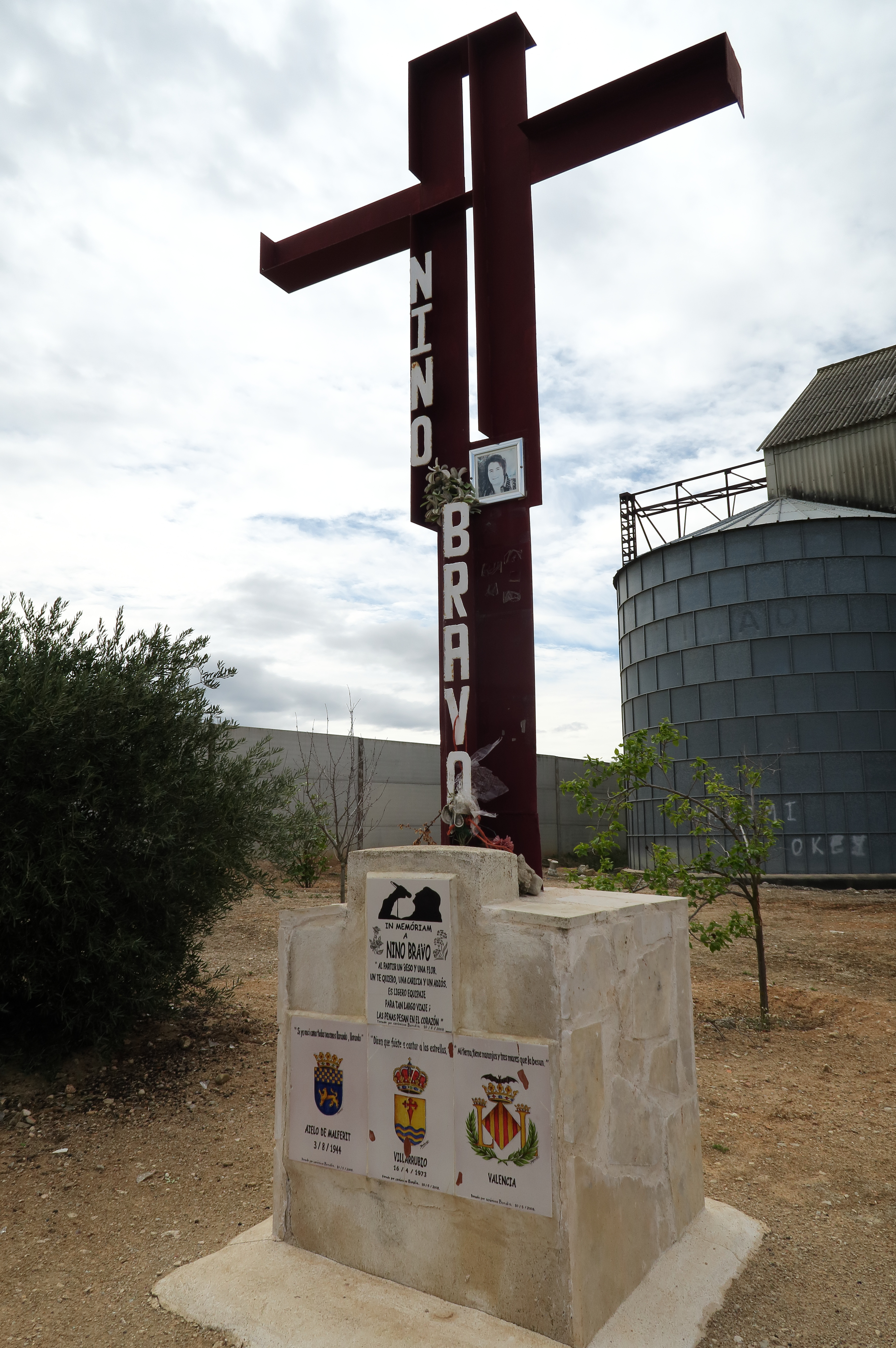 Nino Bravo, monumento en Villarrubio en el lugar dónde tuvo en accidente mortal